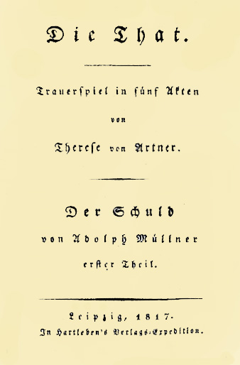 Deckblatt des Theaterstücks Die That von Therese von Artner.